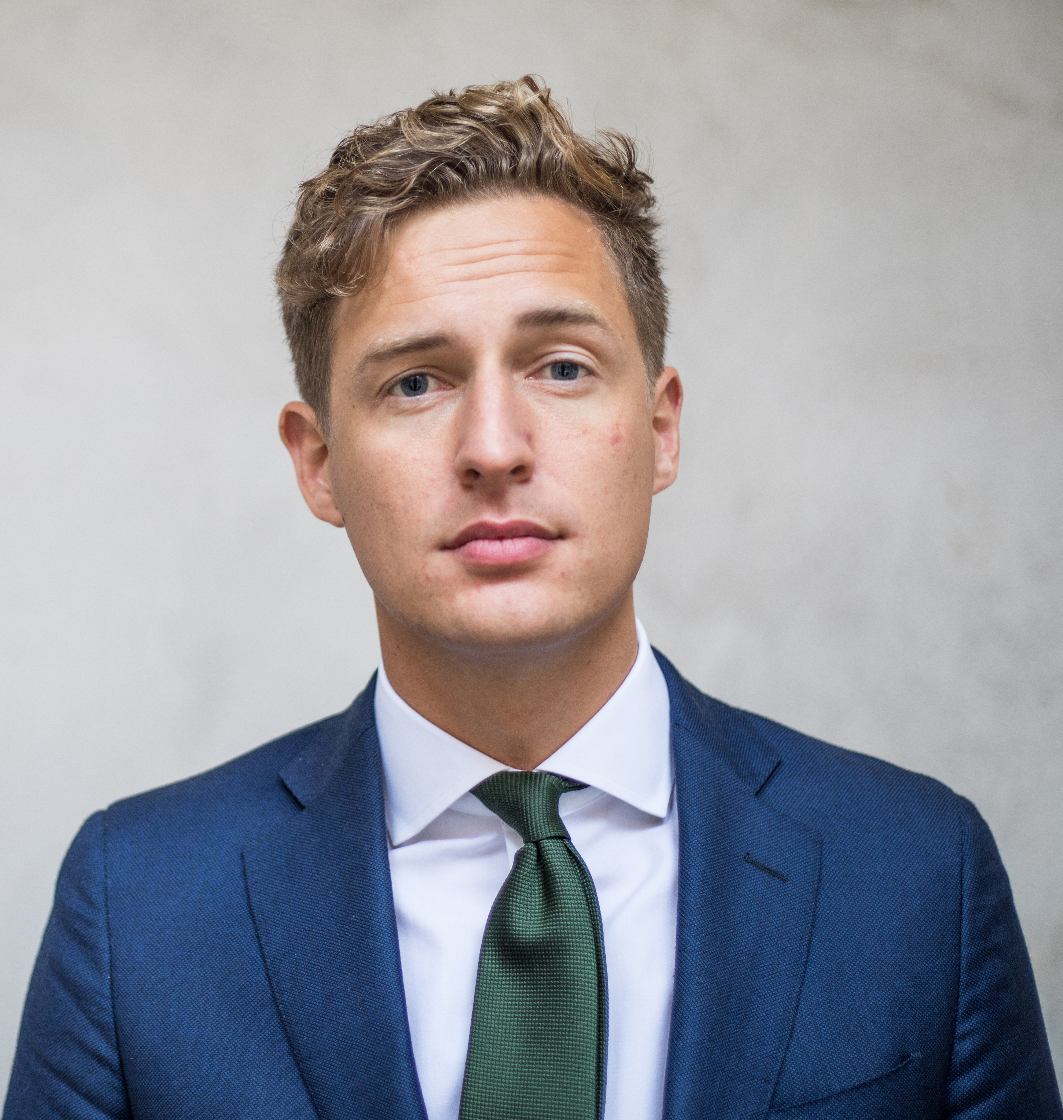 Emil Källström 2017/10 Ekonomisk politisk talesperson